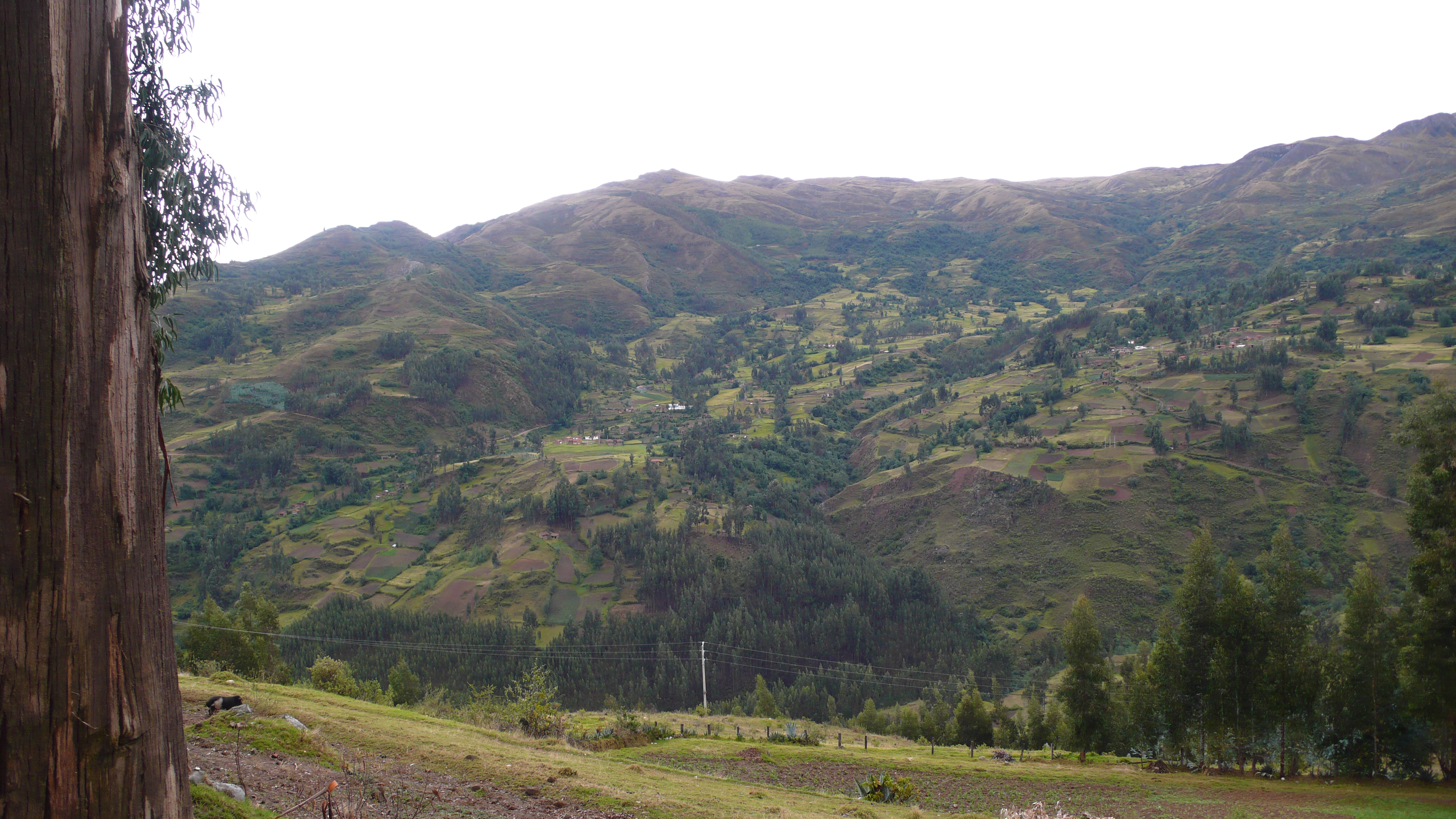 View on the surroundings of Chacas, Peru